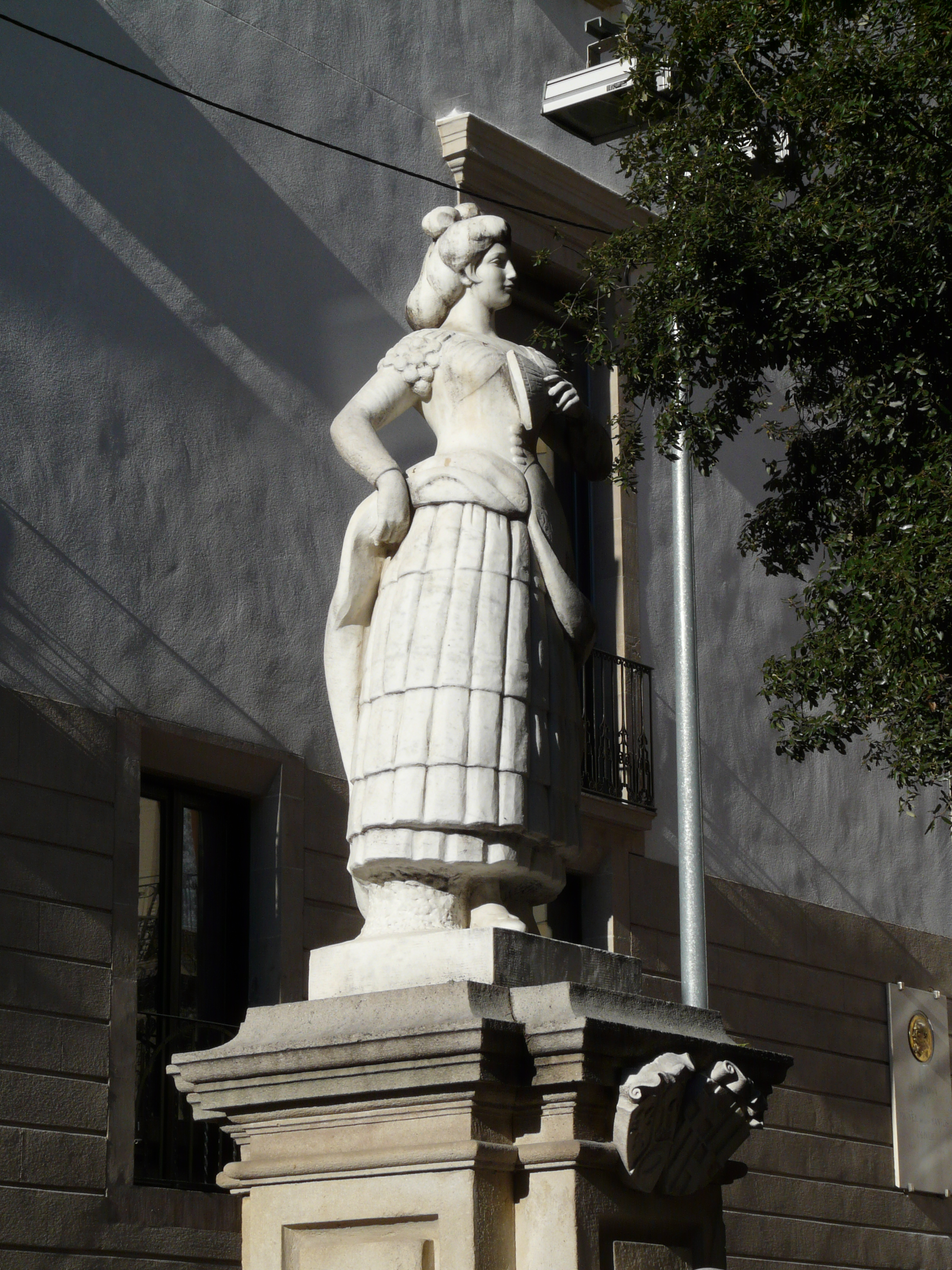 Maja madrilenya. Pl. de la Vila de Madrid (Barcelona). Escultor: Lluís Montané i Molfulleda, signada. Material: marbre blanc sobre pedestal de pedra. 1958. 34″ N, 2° 10′ 19.16″ E